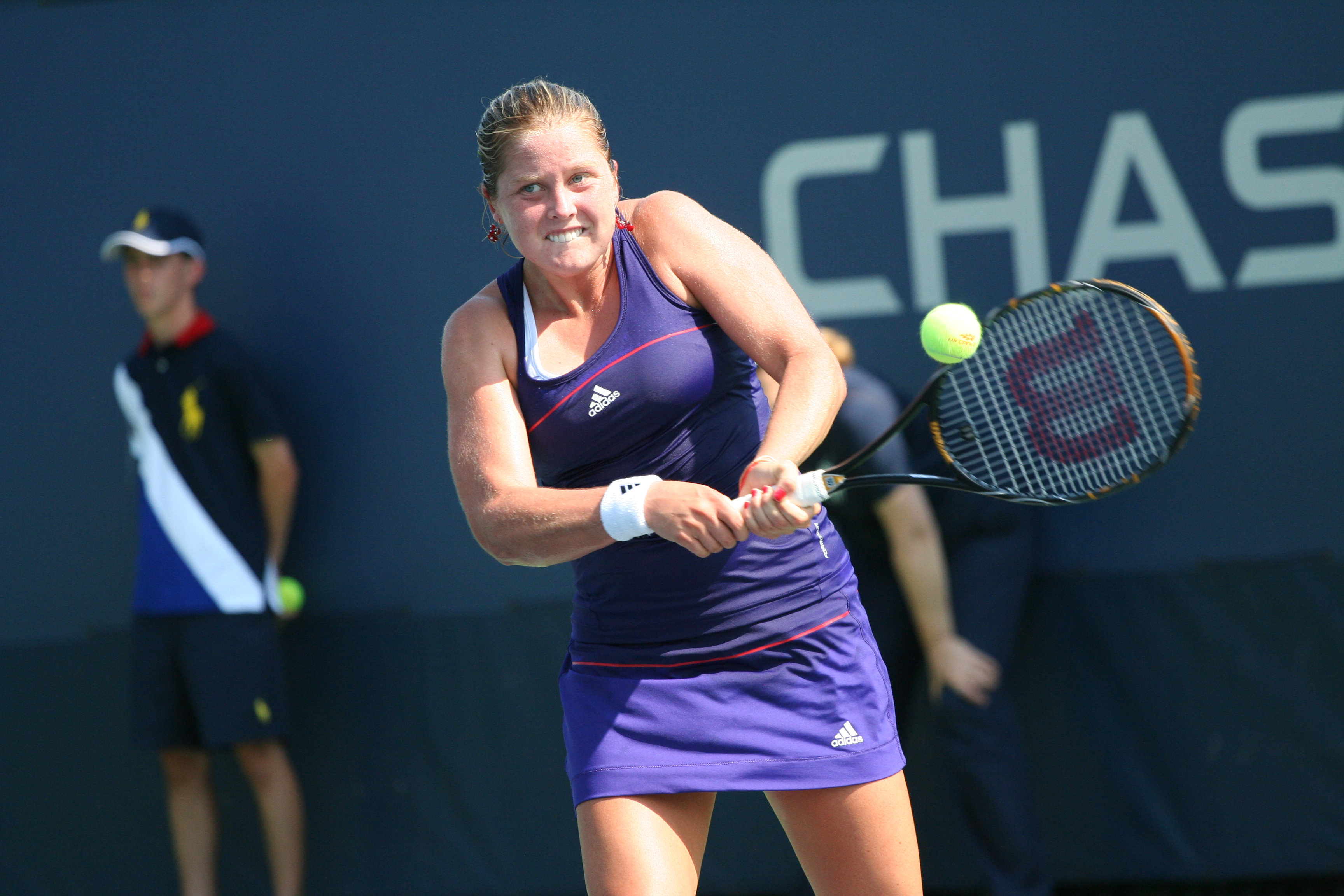 U.S. Open Aug. 31, 2010